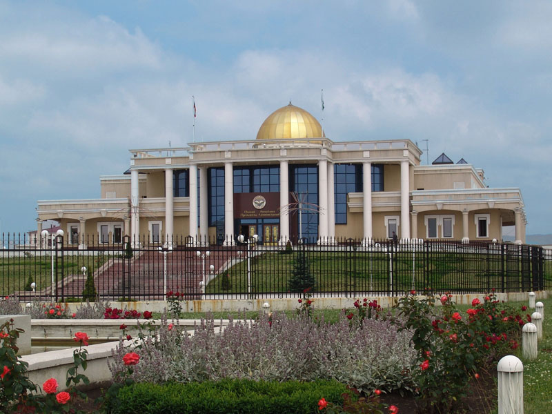 presidential Palace in Magas